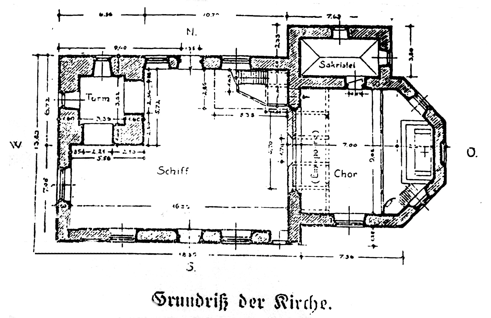 Grundriß-Plan der Kirche - ergänzt mit aktuellen Einbauten.